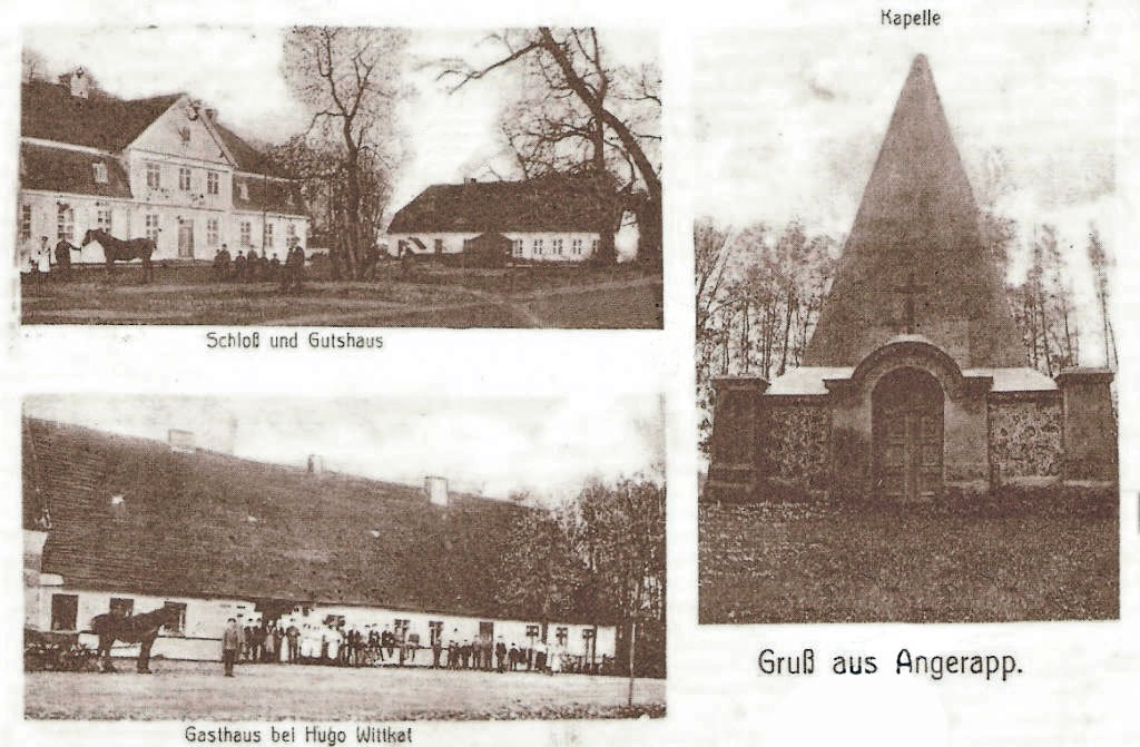 Rapa (niem. Angerapp, 1938-1945 Kleinangerapp)